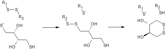 DTT és diszulfidhidat tartalmazó molekula általános reakciómechanizmusa.